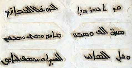 Engraving commemorating the extension of Mar Awtel Church in 1776